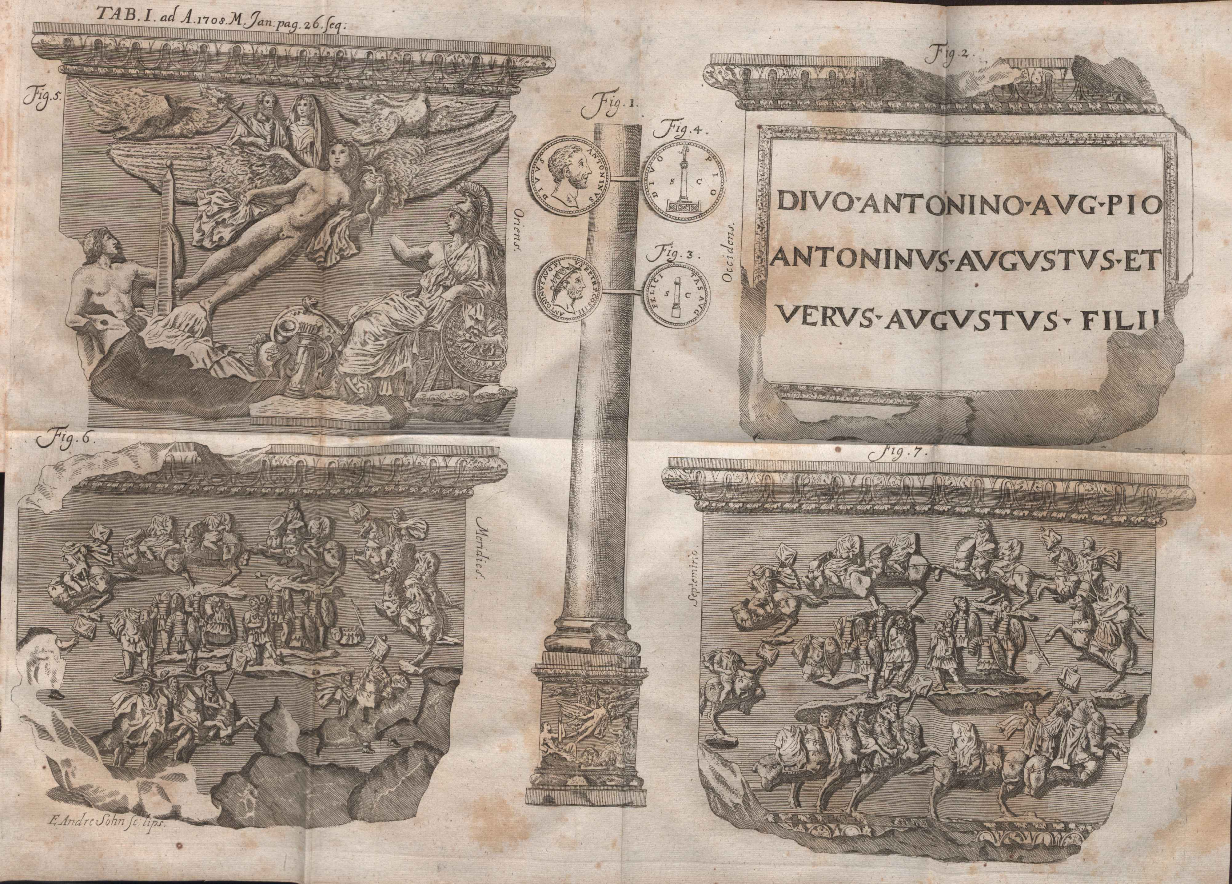 Illustration